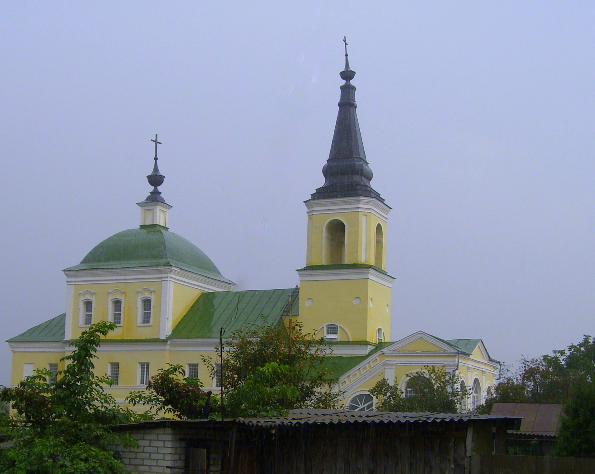 Петропавловская церковь (Брянская область, Севск, улица Ленина, 70)